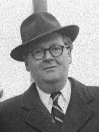 Parkring, Dr. Nyírő Gyula professzor feleségével. Háttérben balra a MAK (Museum für Angewante Kunst), mellette az Iparművészeti Egyetem (Univ. für Angewante Kunst). Location: Austria, Vienna Tags: portrait, signal Title: Parkring, Dr. Nyírő Gyula professzor feleségével. Háttérben balra a MAK (Museum für Angewante Kunst), mellette az Iparművészeti Egyetem (Univ. für Angewante Kunst).